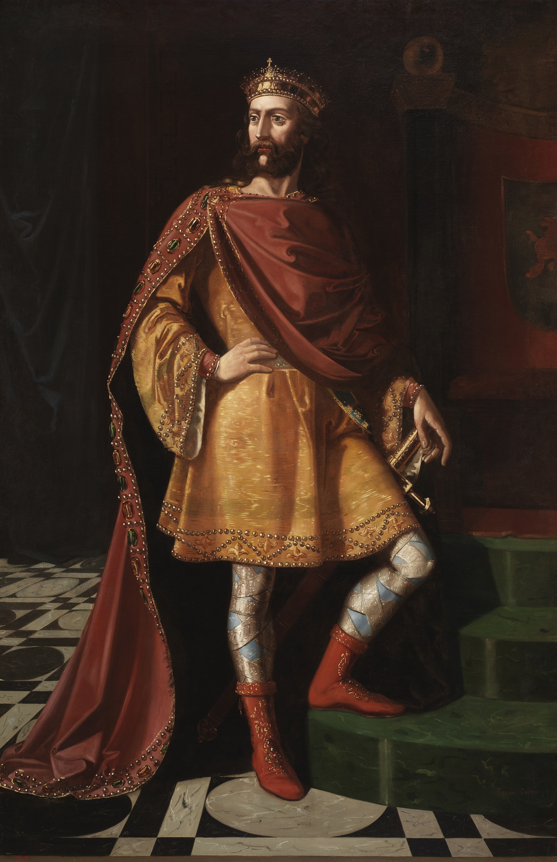 El lienzo representa a Ervigio, rey de los visigodos, que reinó entre los años 680 y 687. Sucedió al rey Wamba y fue sucedido a su vez por el rey Égica. El rey aparece representado vistiendo una túnica ocre dorada y manto de color rojo.